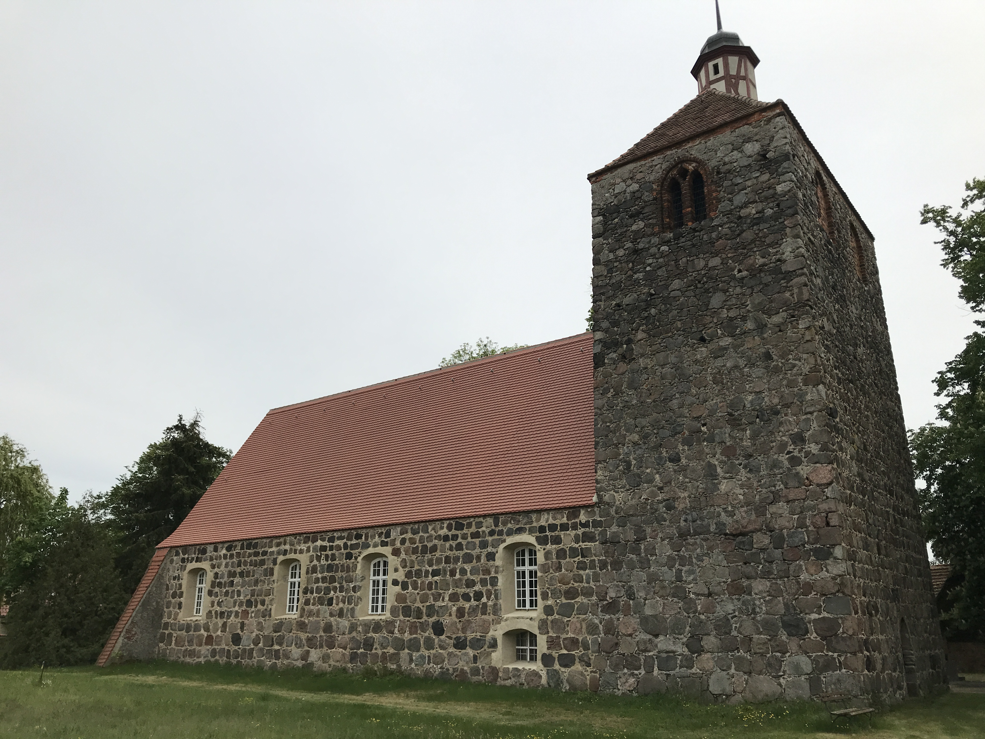 Die Dorfkirche Frankenfelde ist eine Feldsteinkirche aus der zweiten Hälfte des 13. Jahrhunderts. Im Innenraum steht unter anderem ein polygonaler Kanzelkorb aus der Zeit um 1700.